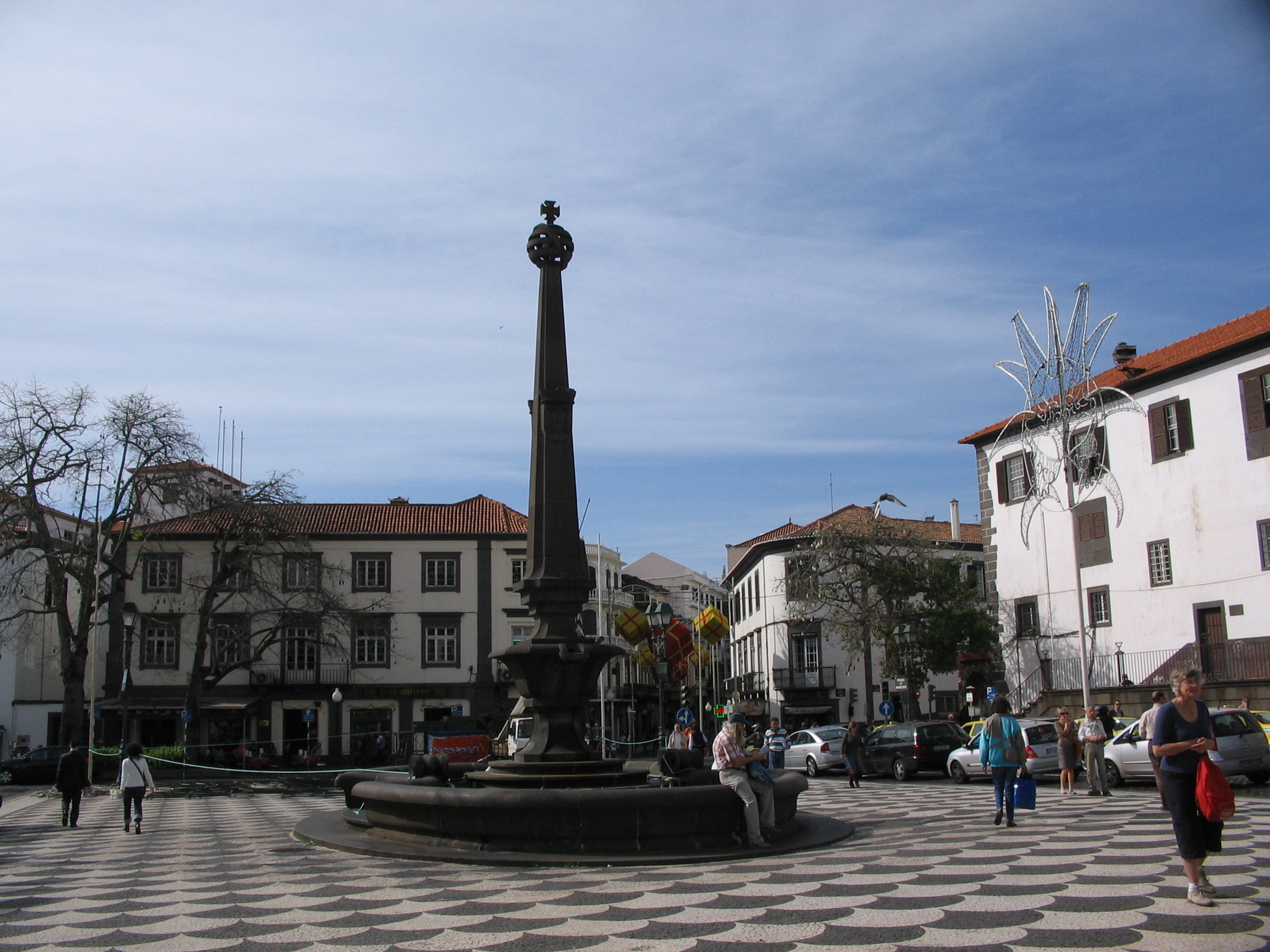 A Városház tér (Funchal, Madeira)